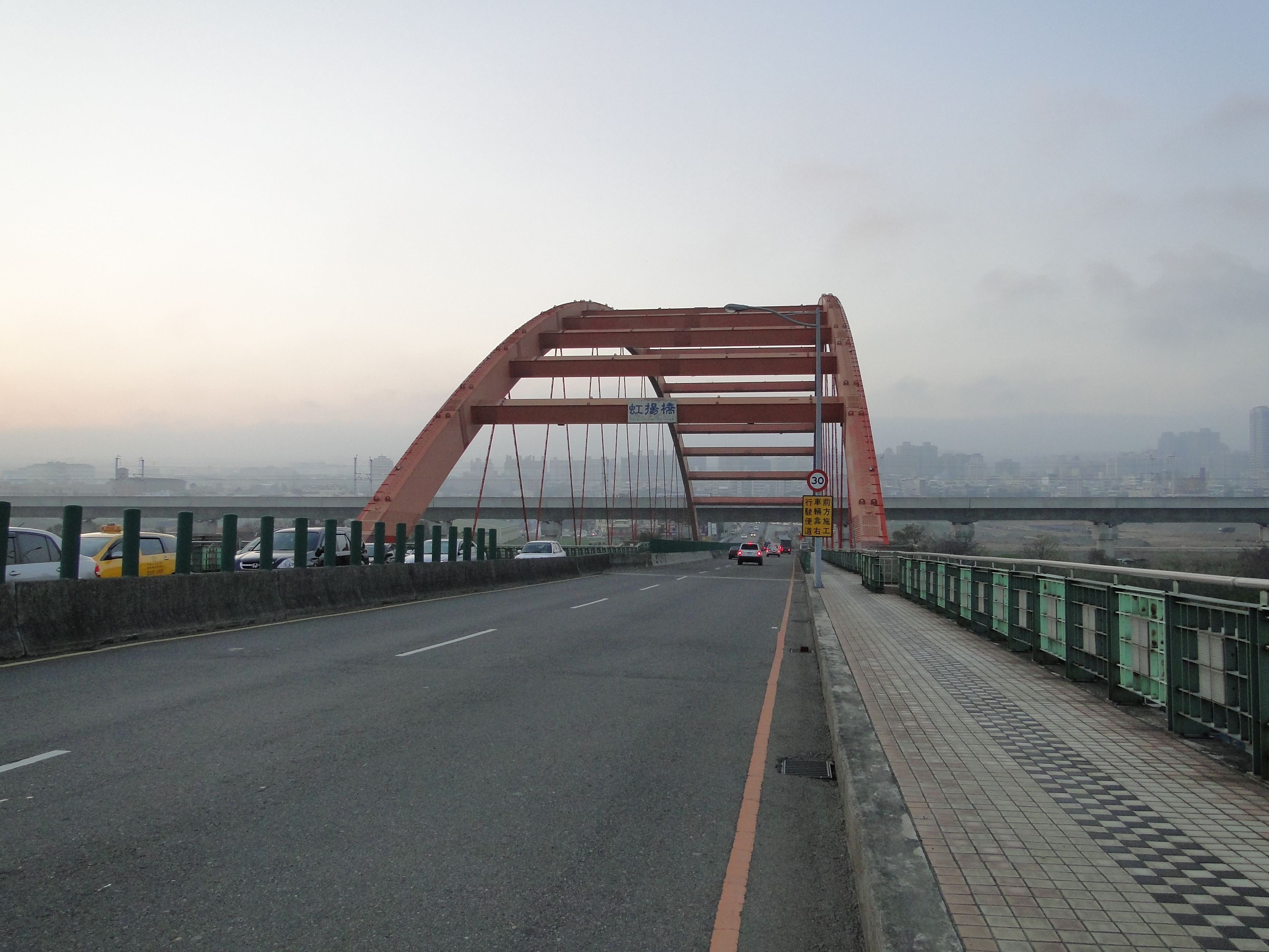 中文（台灣）: 台灣台中市虹揚橋。